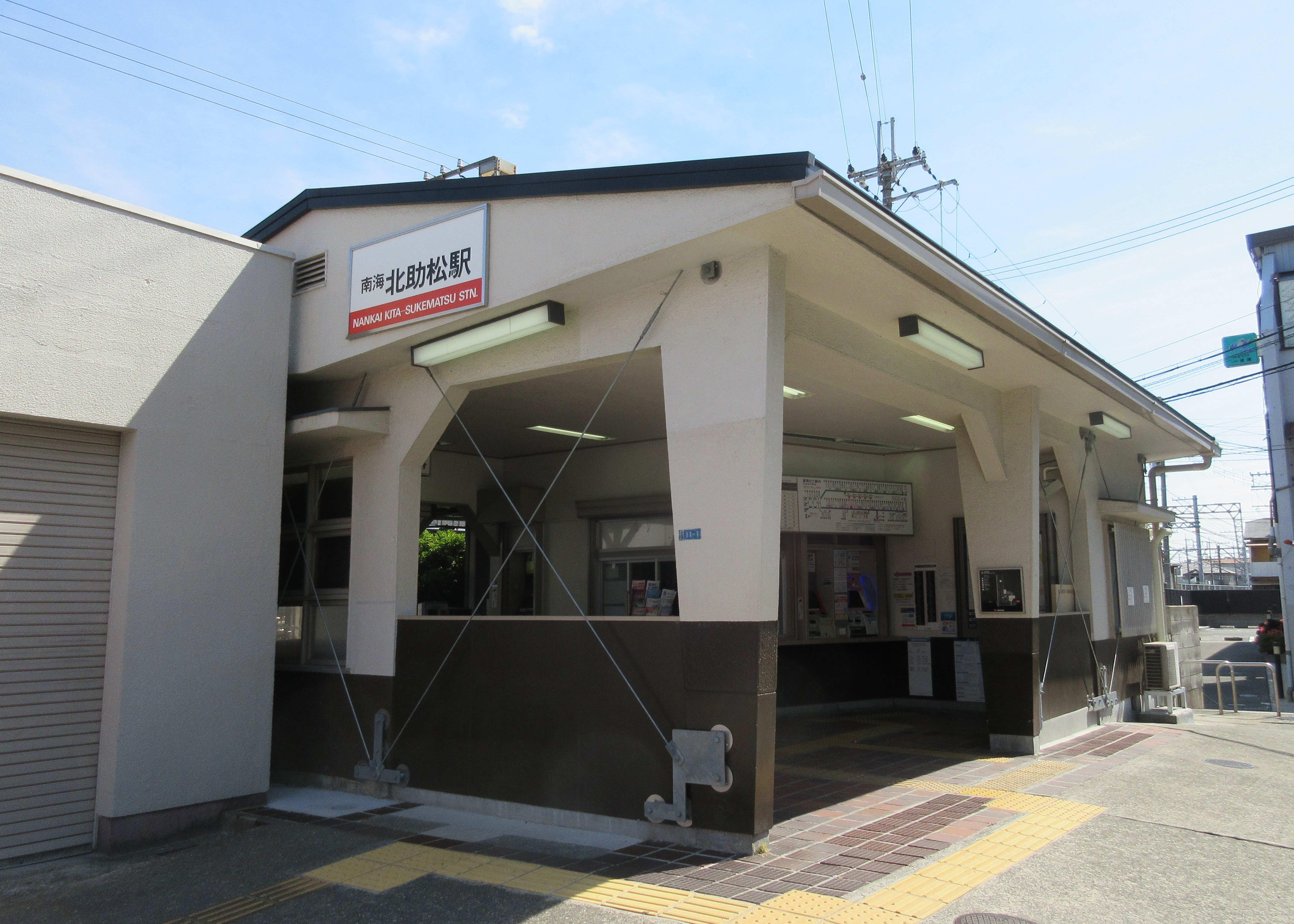 南海電鉄北助松駅